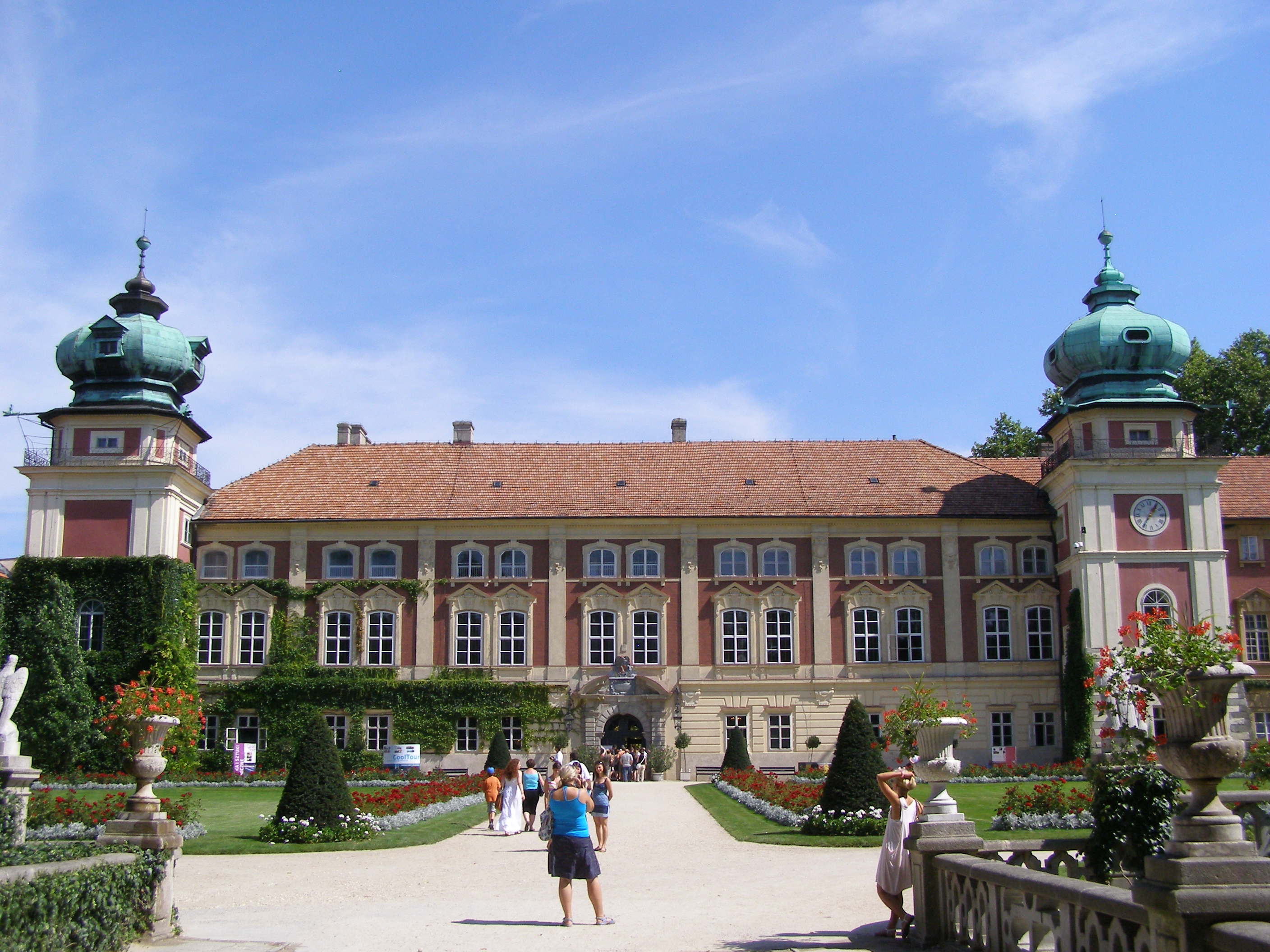 Łańcut - Zamek